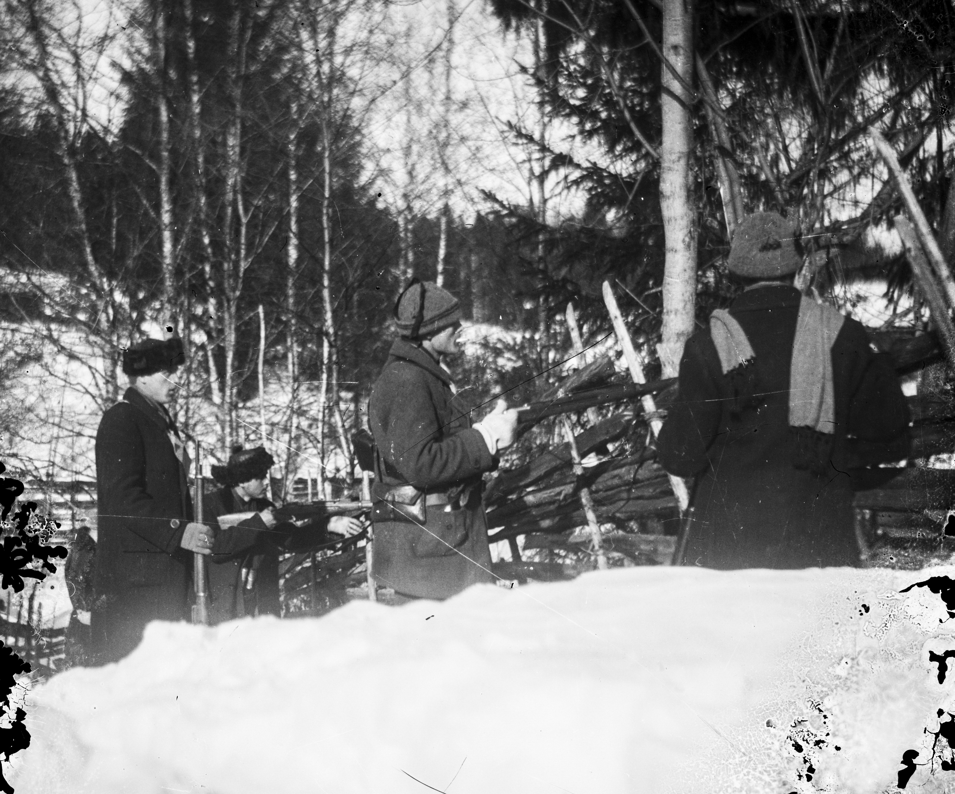 CC-BY Tampere 1918, kuvaaja tuntematon, Vapriikin kuva-arkisto. Finnish Civil War 1918, Photographer unknown, Vapriikki Photo Archives.